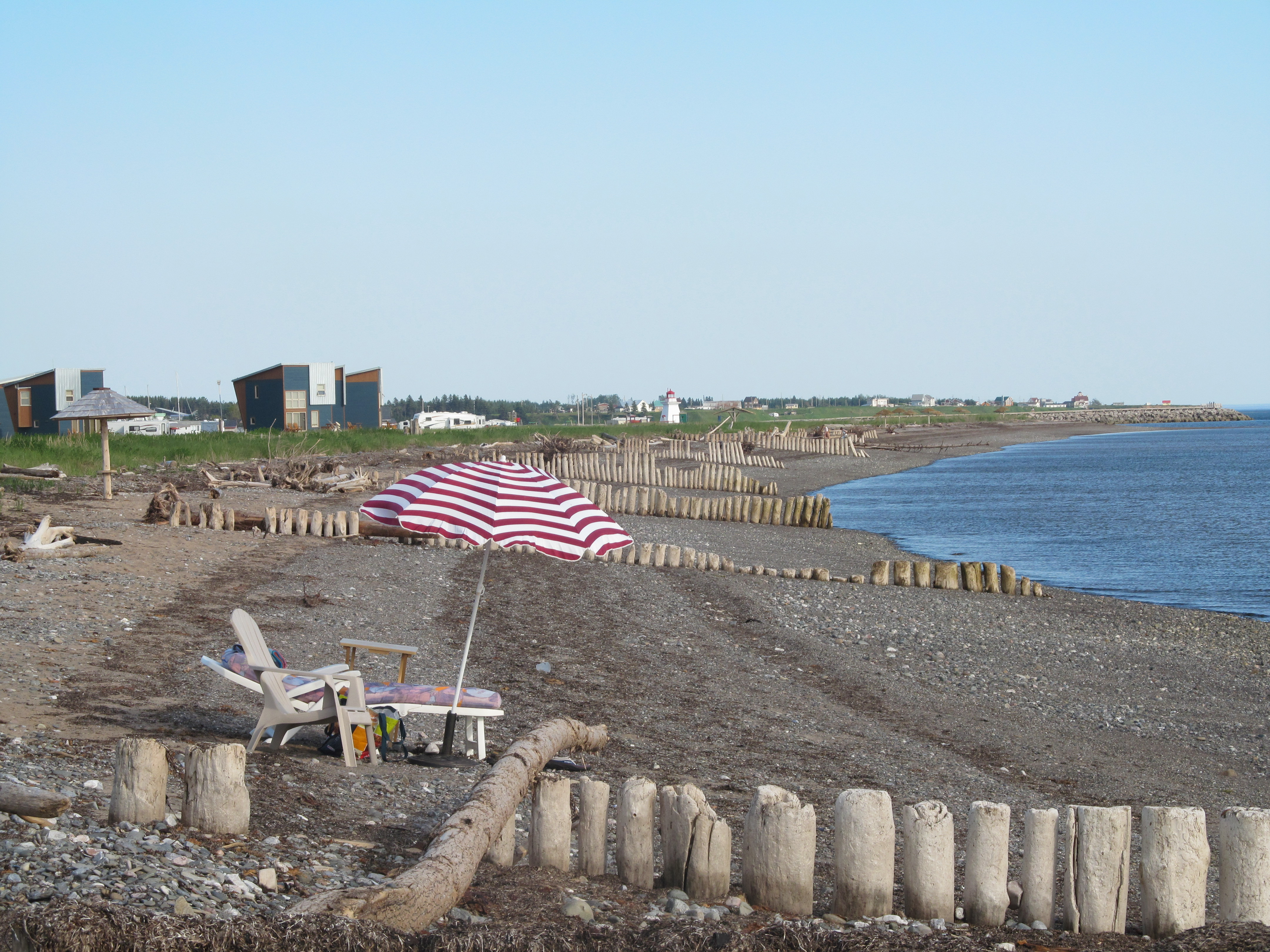 Plage Beaubassin, Bonaventure, Québec Au centre : phare de la pointe Bonaventure